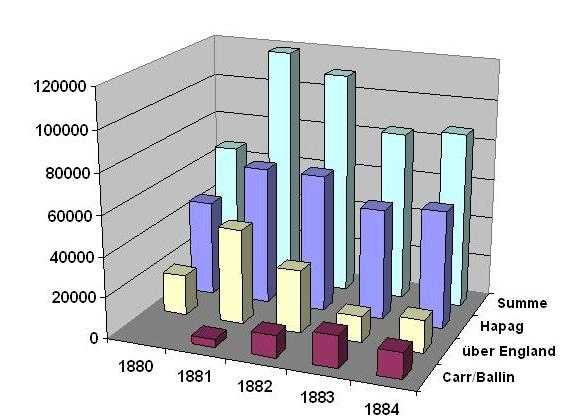 Auswanderung mit der Carr-Linie